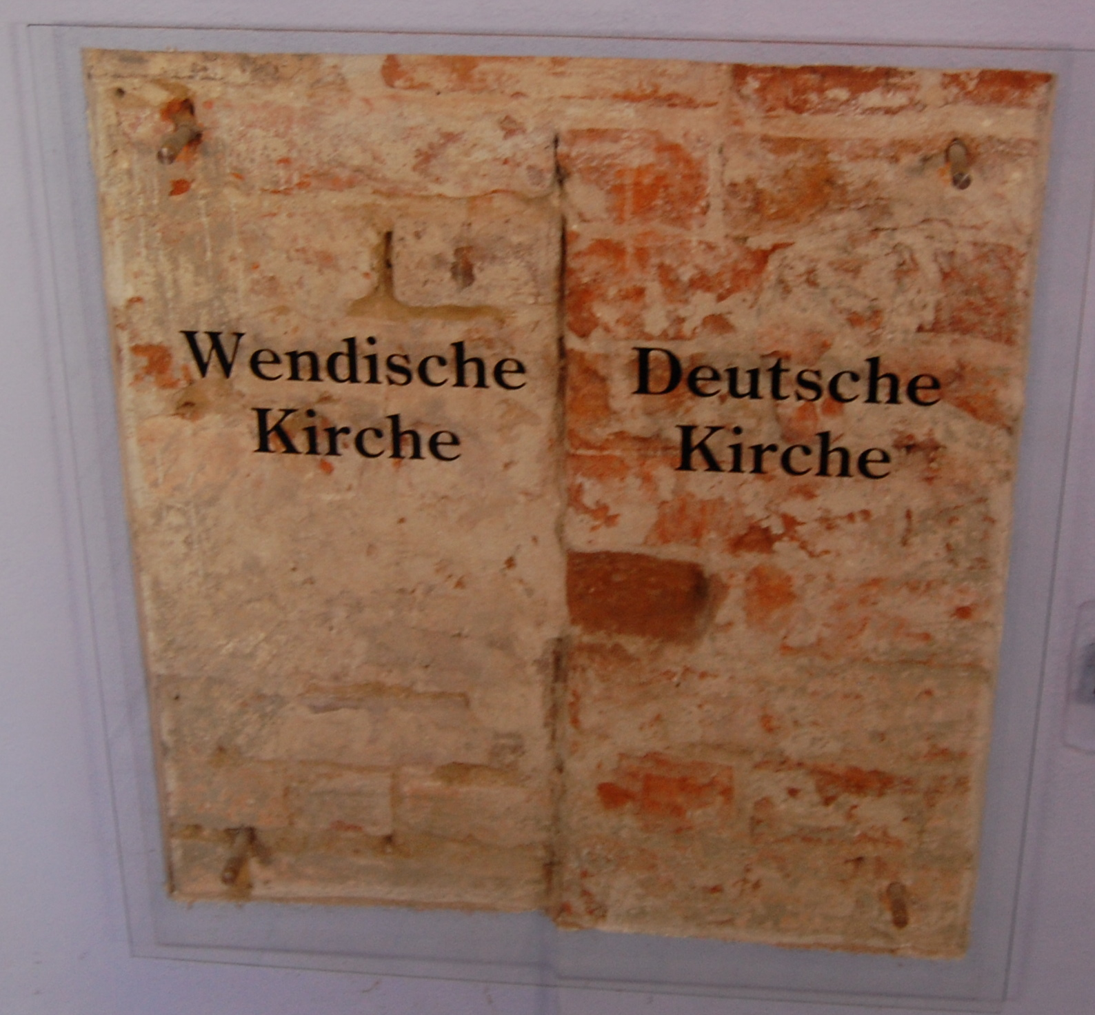 Tafel in der Sakristei der Wendisch-Deutschen Doppelkirche in Vetschau an der Stelle an der die beiden Gebäudeteile aufeinander treffen